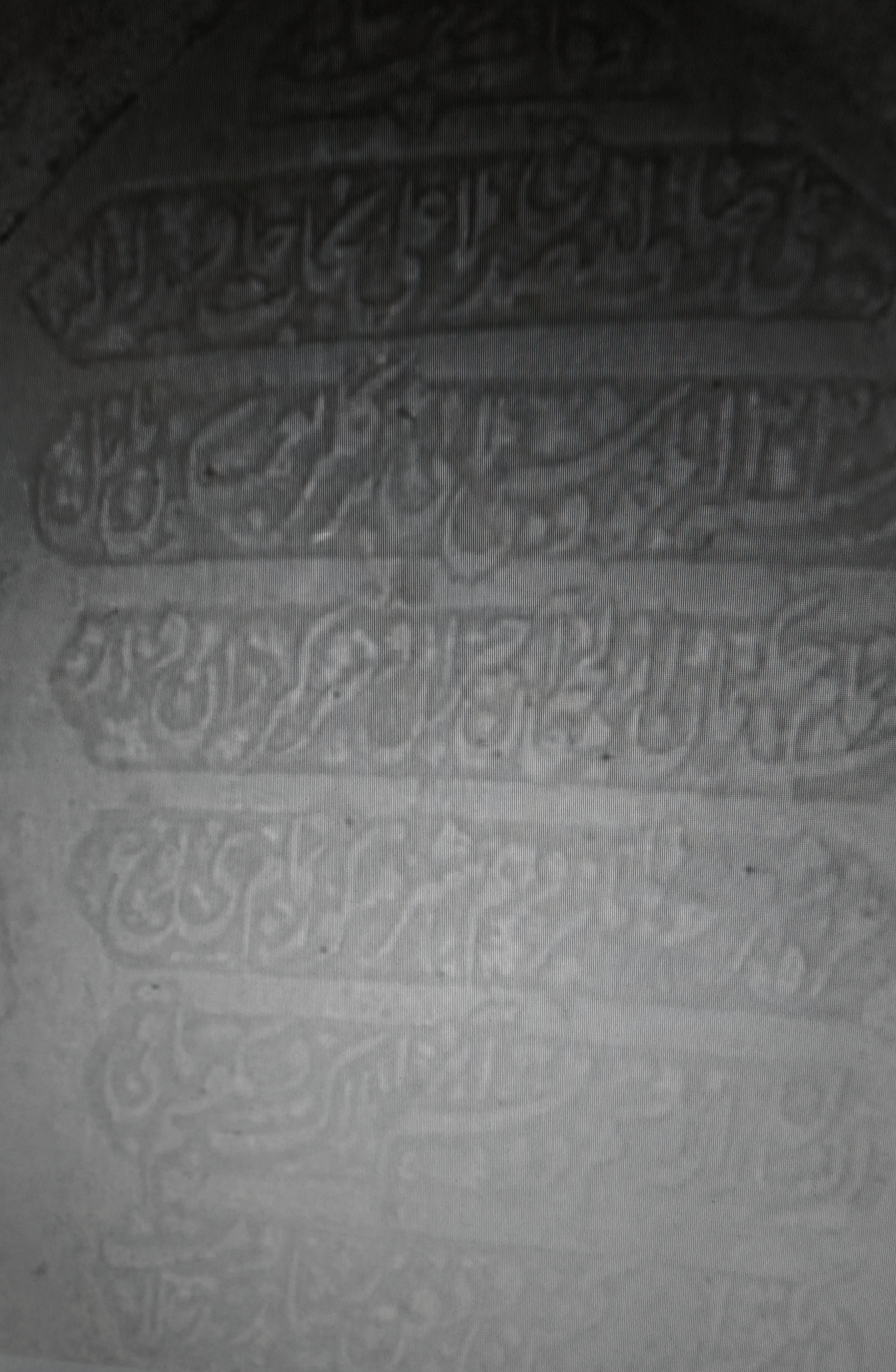 تصویر مربوط به یکی از افراد فوت شده بر اثر آنفلوانزای اسپانیایی و مربوط به سال 1918 میلادی و ۱۳۳۷ قمری می باشد